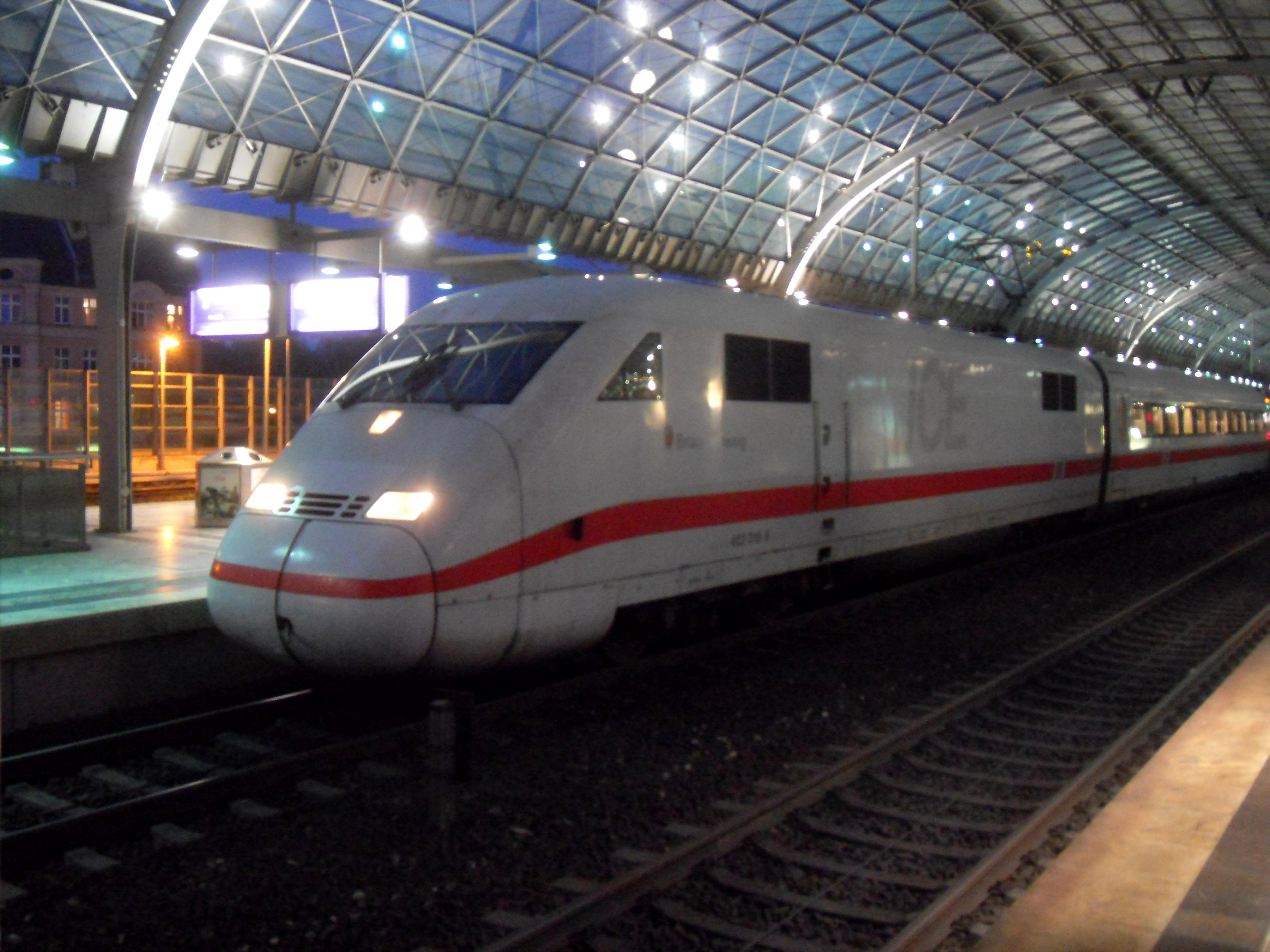 ICE 2 Braunschweig auf Gleis 4 im Bahnhof Berlin-Spandau in Deutschland